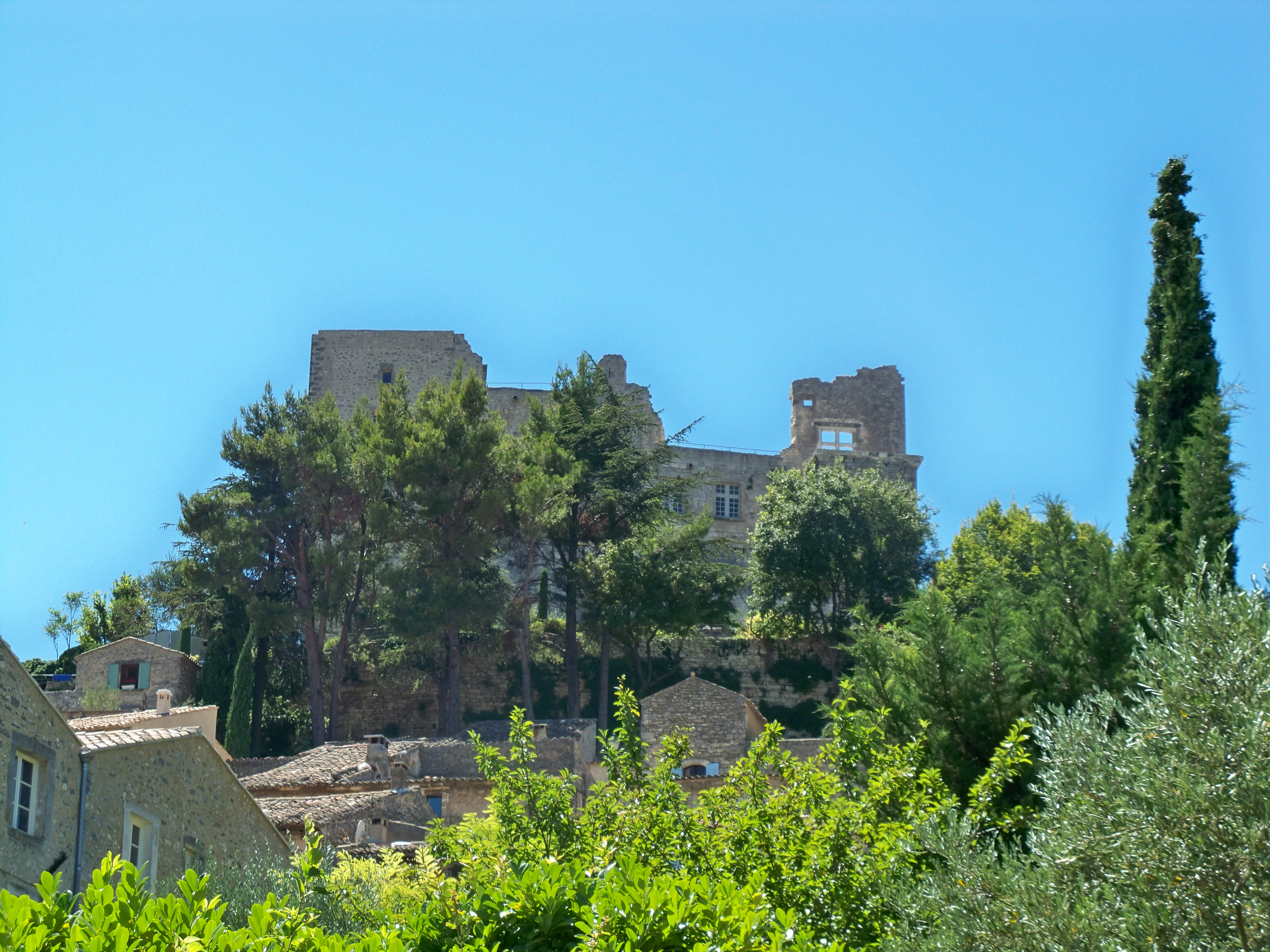 Chateau de Sade à Lacoste, Vaucluse, France